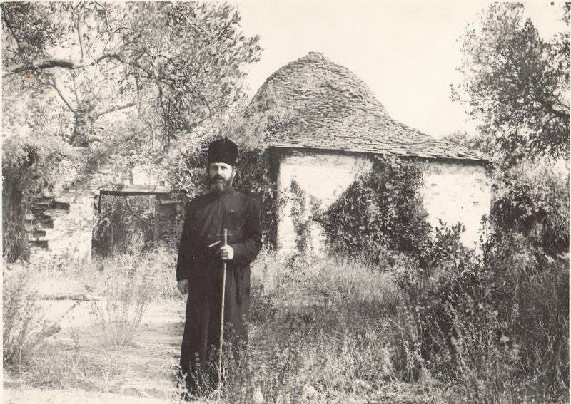 მეუფე ანანია სკიტში